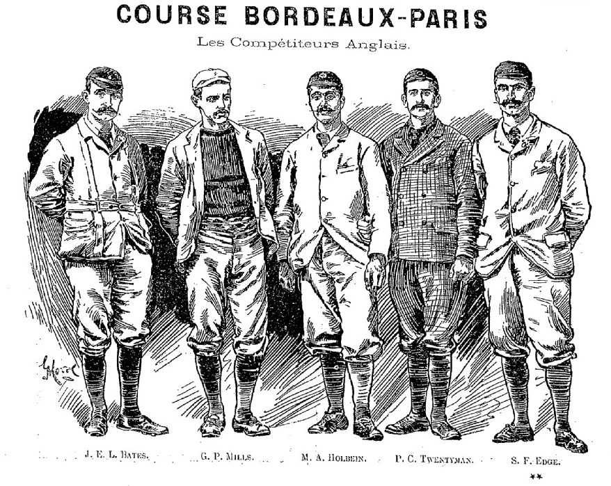 Dessin des participants britanniques de la course cycliste Bordeaux-Paris 1891